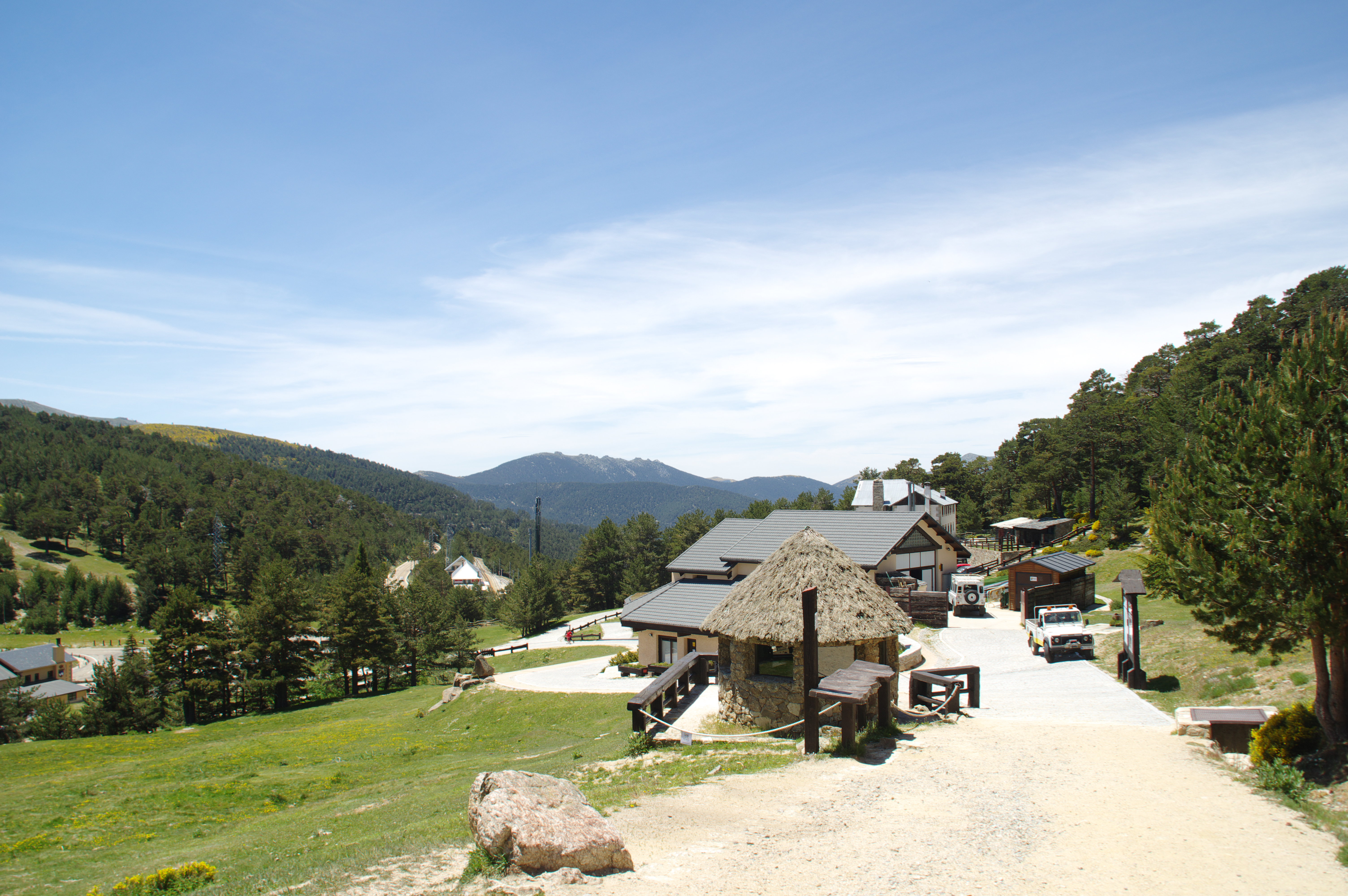 ®s K3 SD Ð ┼ MADRID PEÑALARA según KATREYA